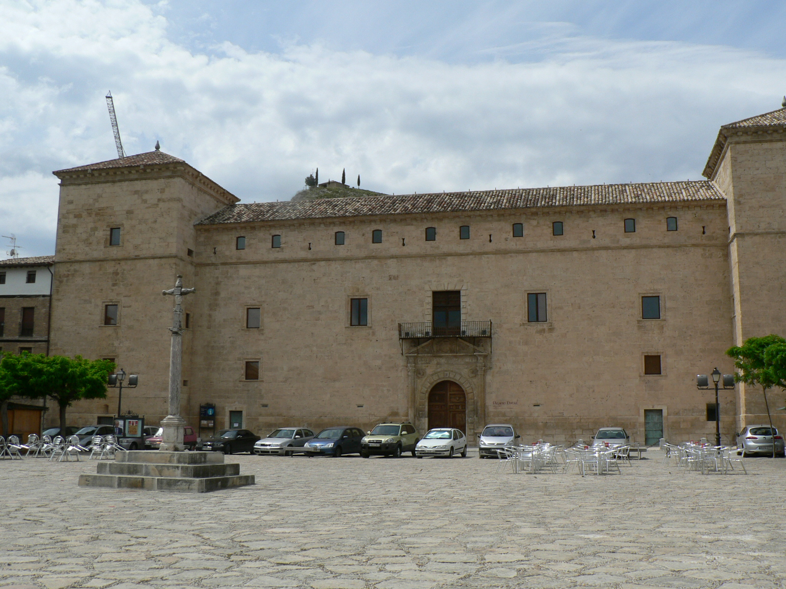 Pastrana, Villa Ducal (Guadalajara, España)